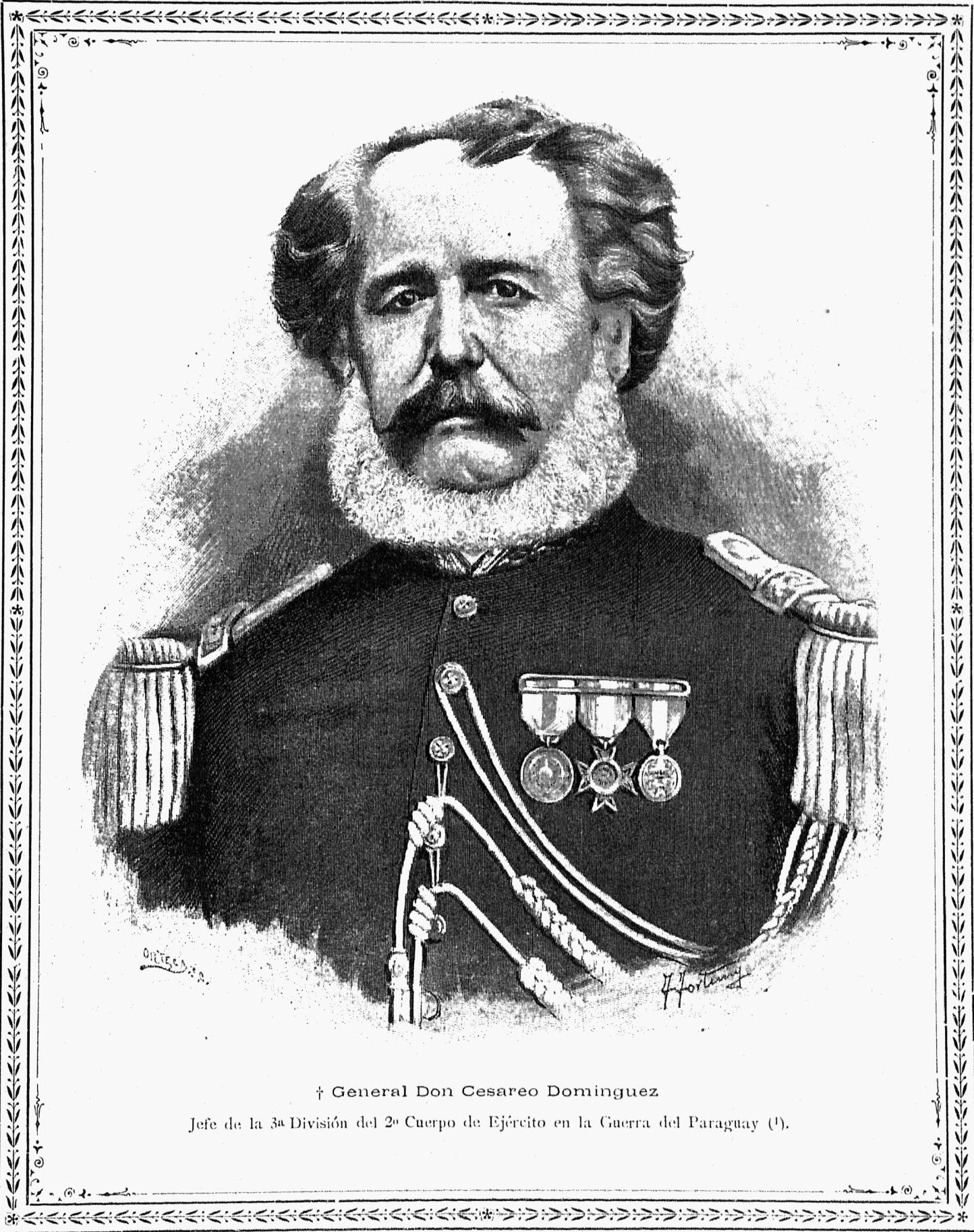 † General D. Cesáreo Dominguez, jefe de la 3ª División del 2º Cuerpo de Ejército en la Guerra del Paraguay.